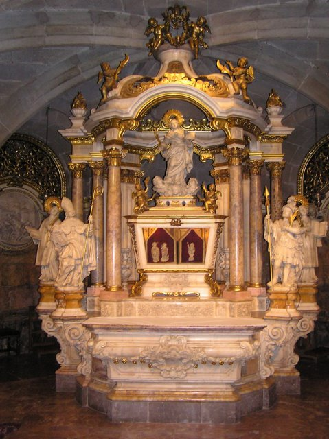 Cripta de Santa Maria de Manresa (La Seu), contiene los restos de Santa Ines, San Fructuoso y San Mauricio.